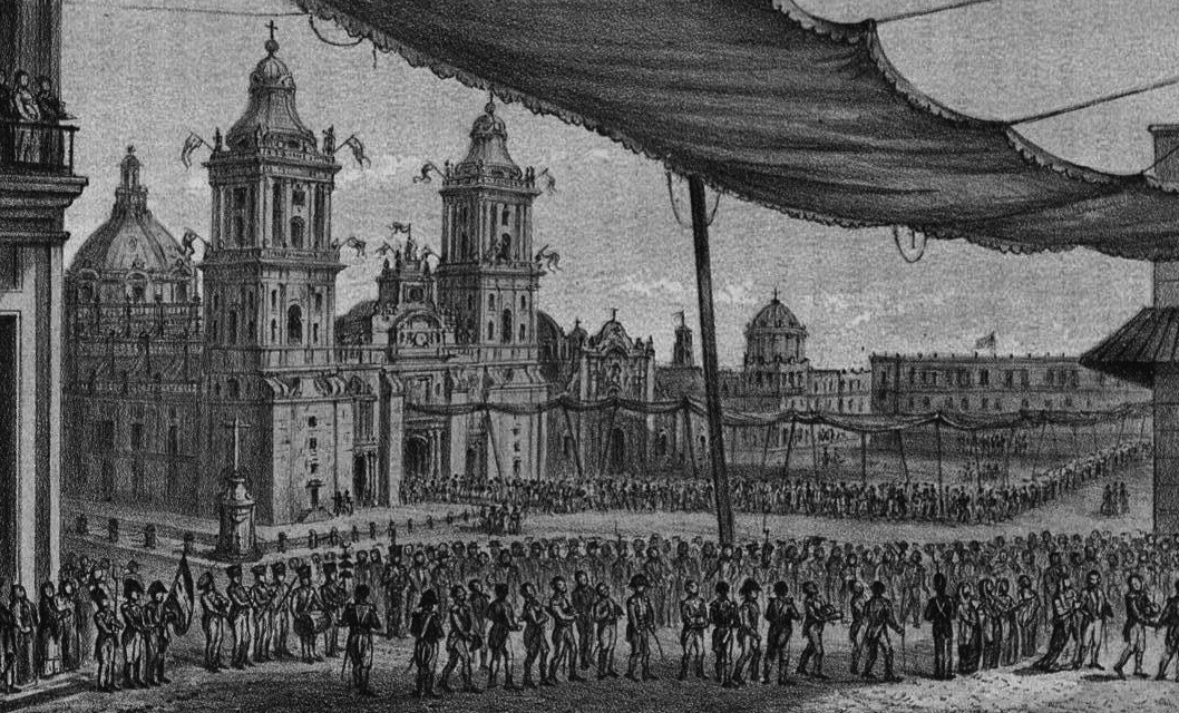 Litografía de la Solemne Coronación de Agustín I; Paseo después de la Solemnidad.